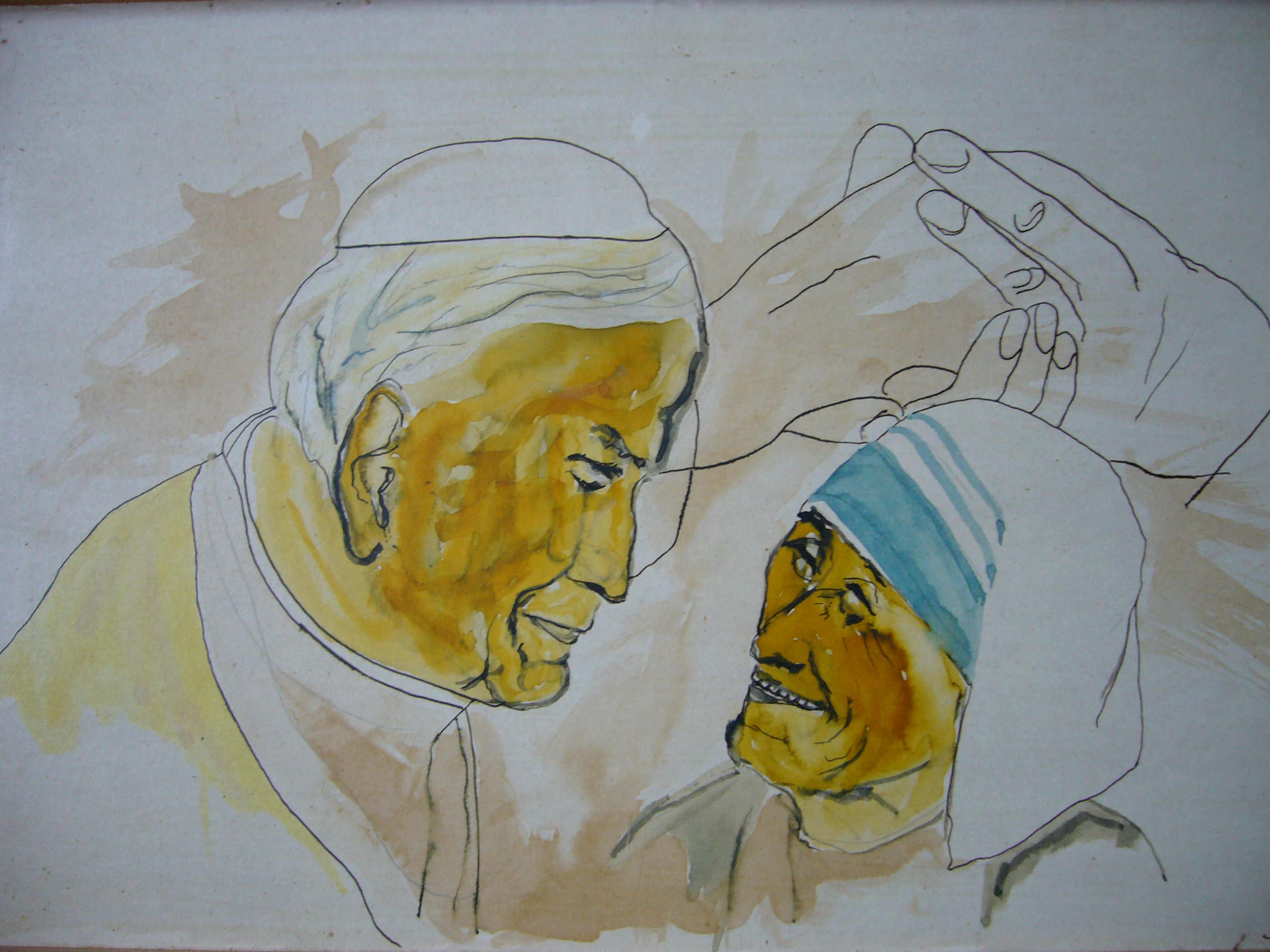 Le Pape et Mère Theresa, Arnaud Courlet de Vregille (Acrylique, 60 x 40)